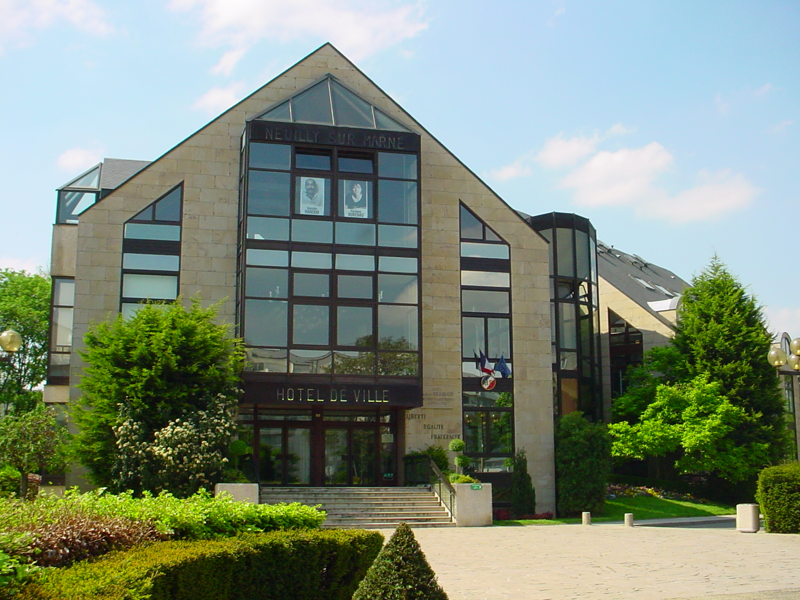 hotel de ville (Mairie) de Neuilly-sur-Marne seine saint denis France. image sans copyright Town hall of Neuilly-sur-Marne seine saint denis France. No copyright. Utilisateur:Freddyz Catégorie:Neuilly-sur-Marne